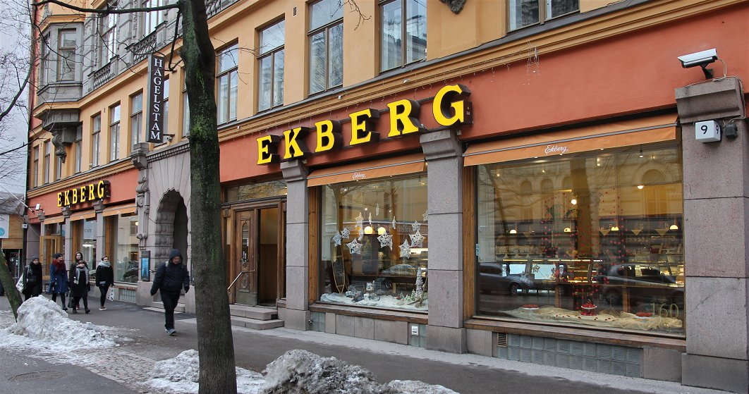 Ekbergin kahvilan vieressä Bulevardi 9:ssä toimii myös Ekbergin leipomon myymälä.